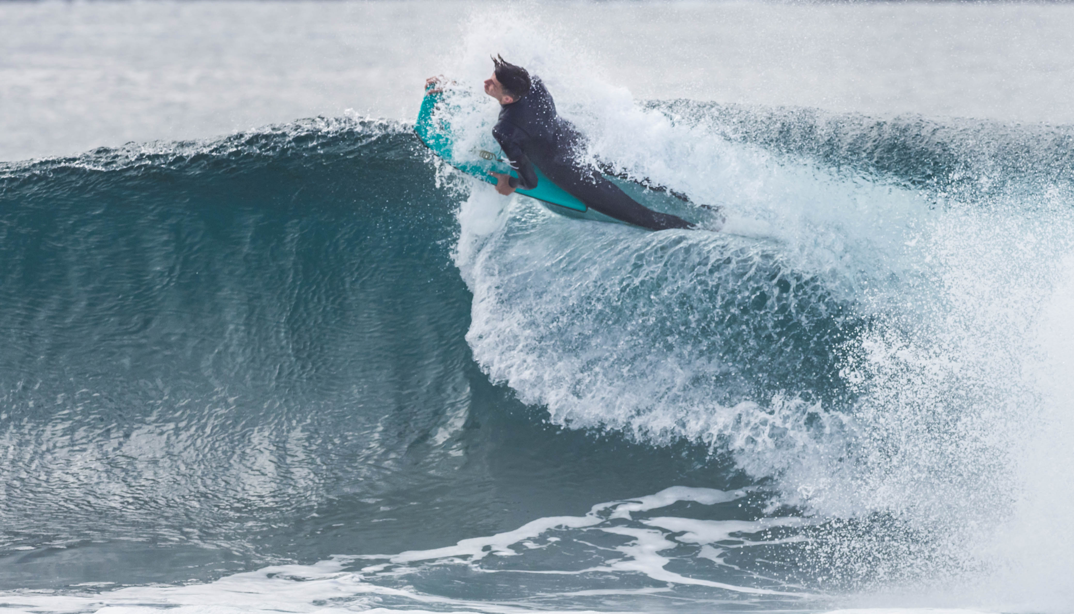 Playa Confital Las Palmas Gran Canaria